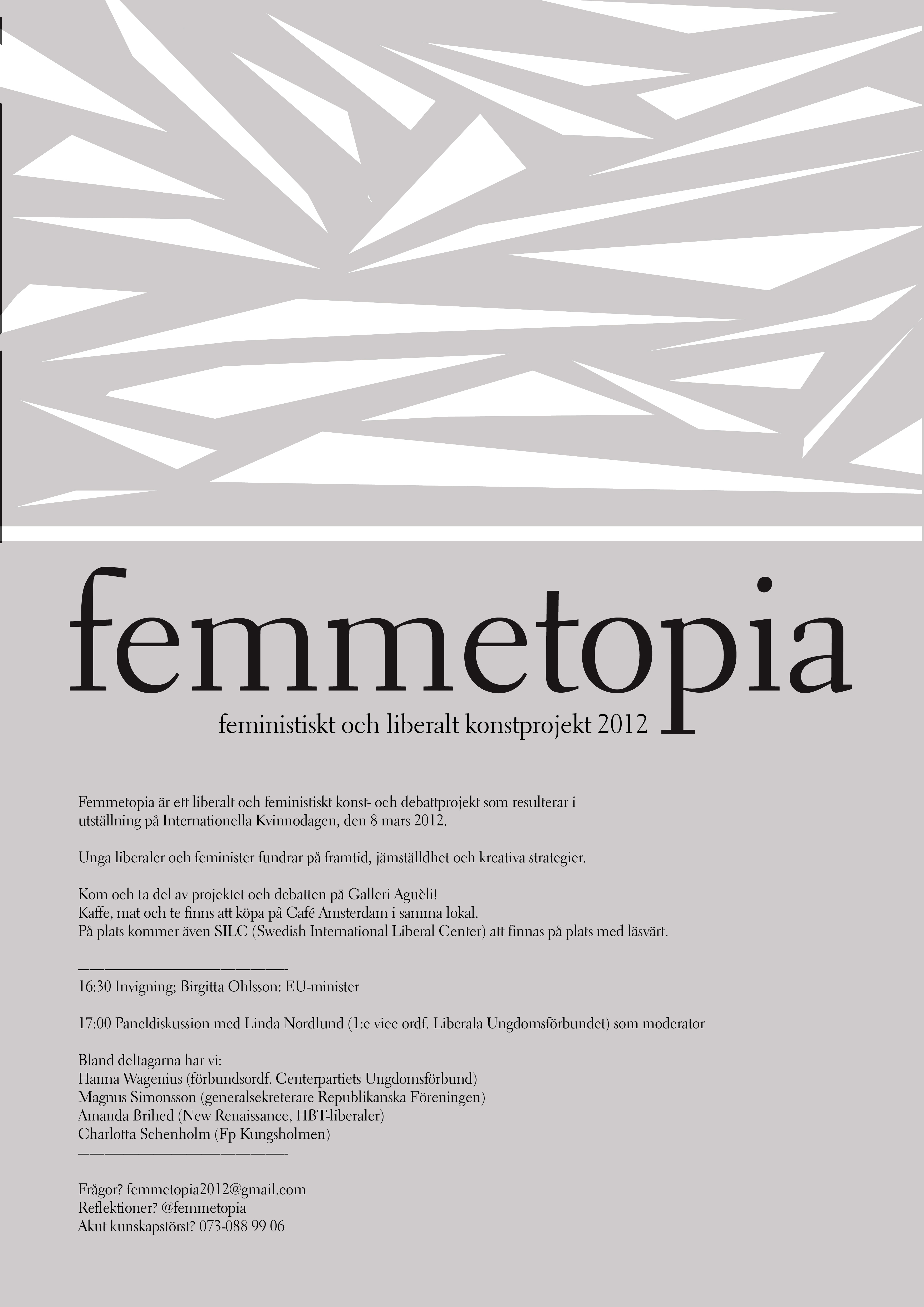 Affisch för konst- och debattprojektet Femmetopia